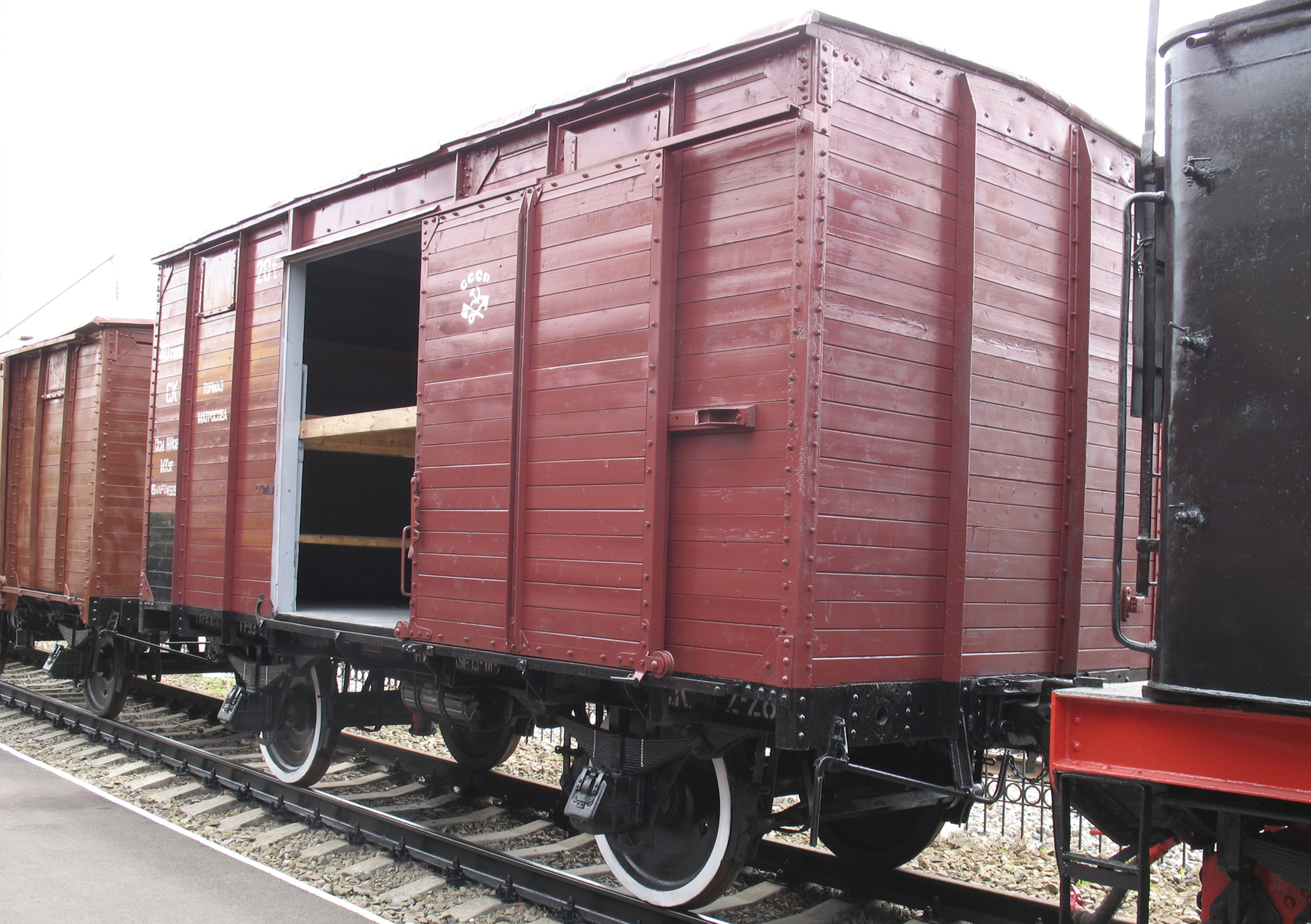 Вагон построен в 1920-х годах